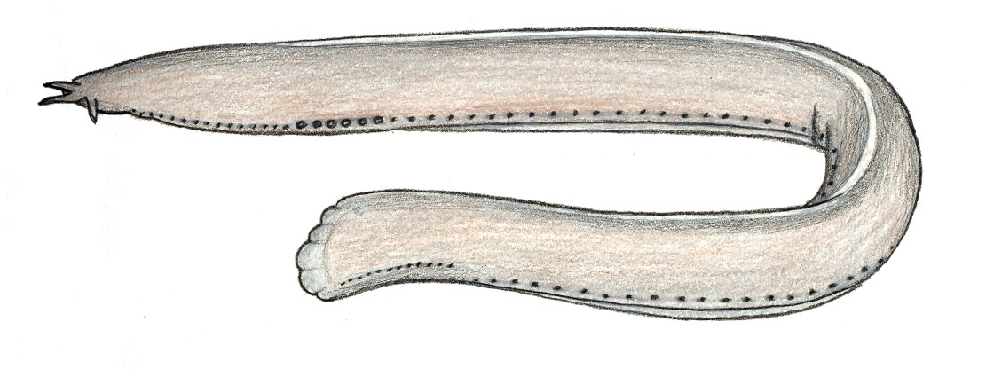 Eptatretus minor Fernholm et Hubbs, 1981